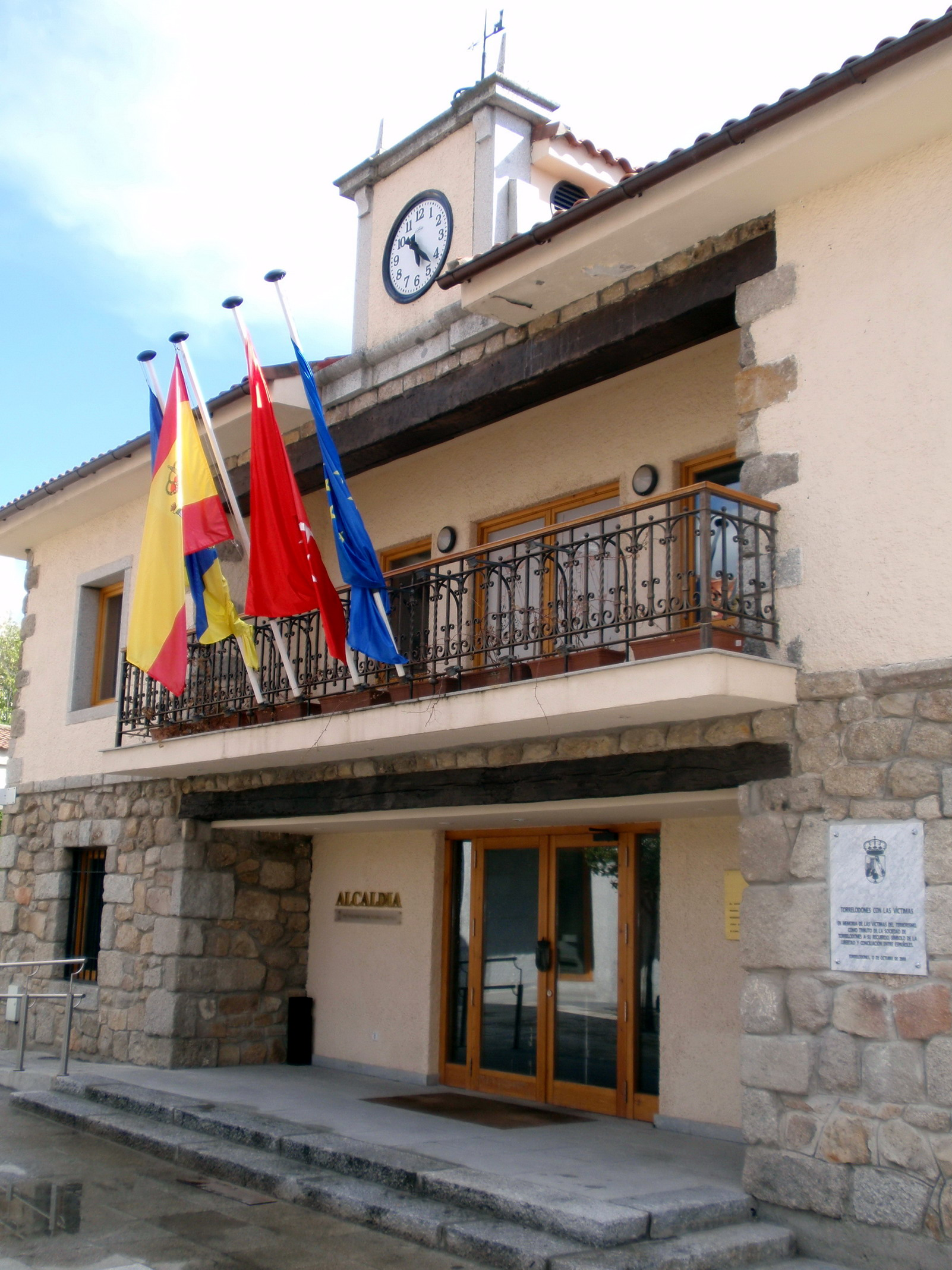 Torrelodones. Ayuntamiento.